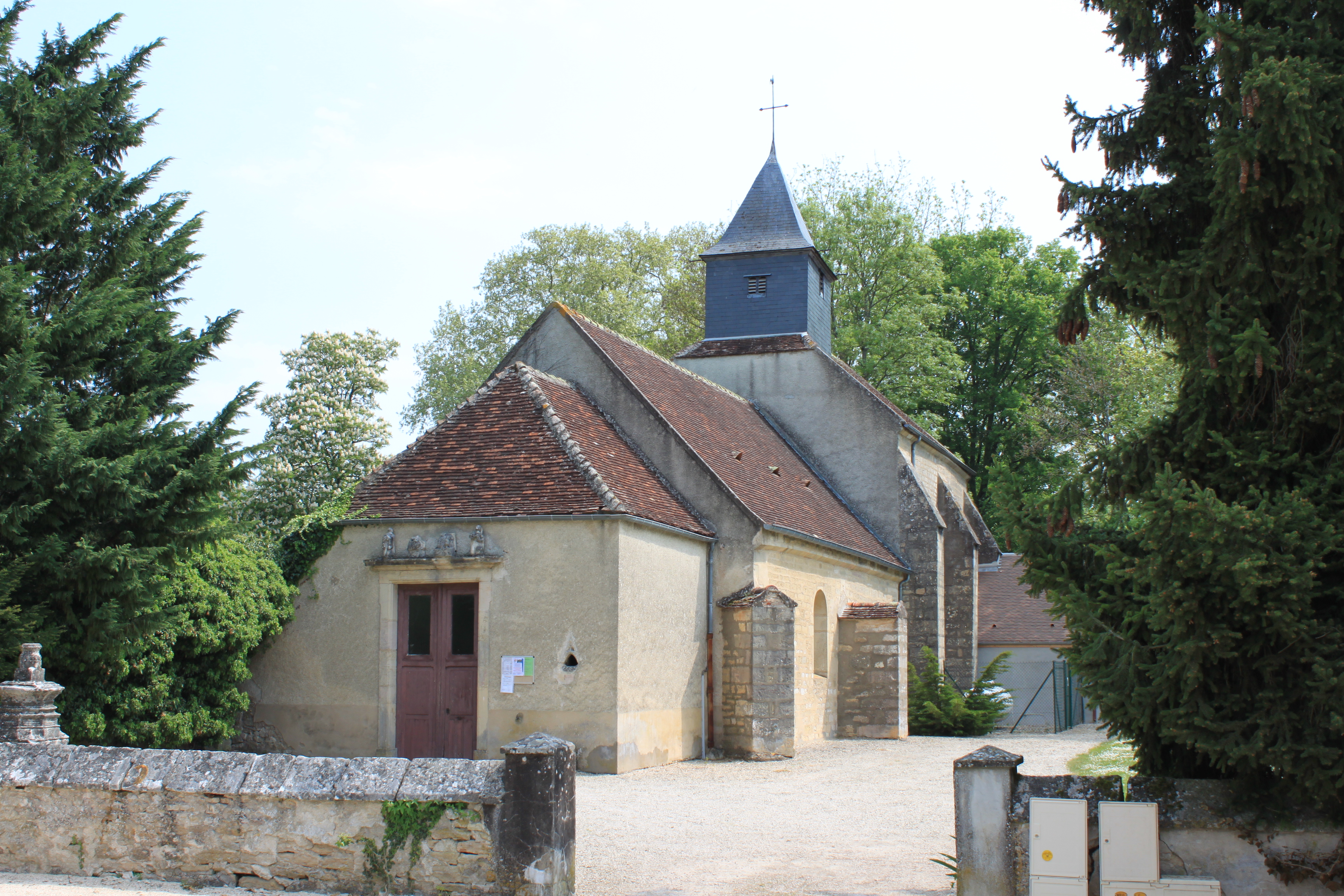 Couternon, Bourgogne, FRANCE